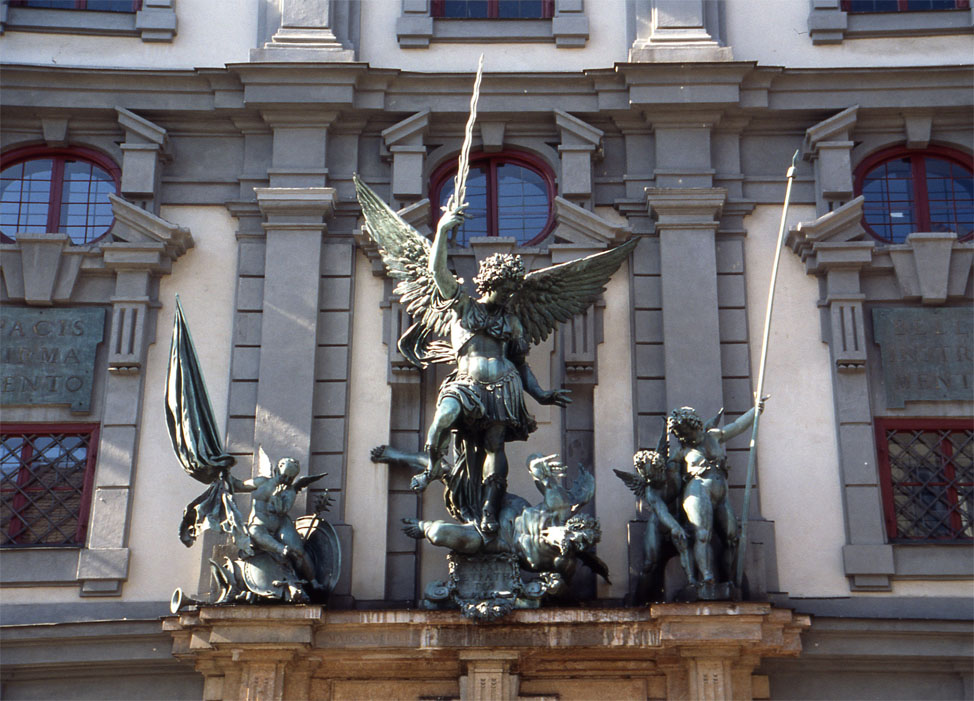 Zeughaus Augsburg Portal